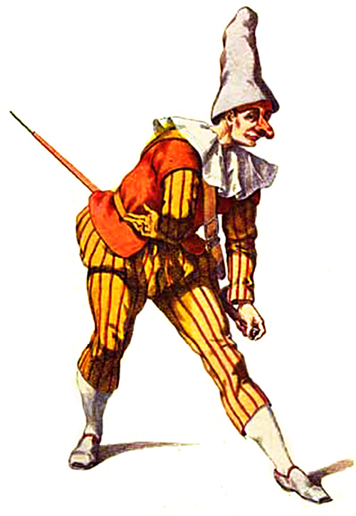 vecchia Incisione a colori raffigurante Giangurgolo, la maschera reggina della commedia dell'arte.